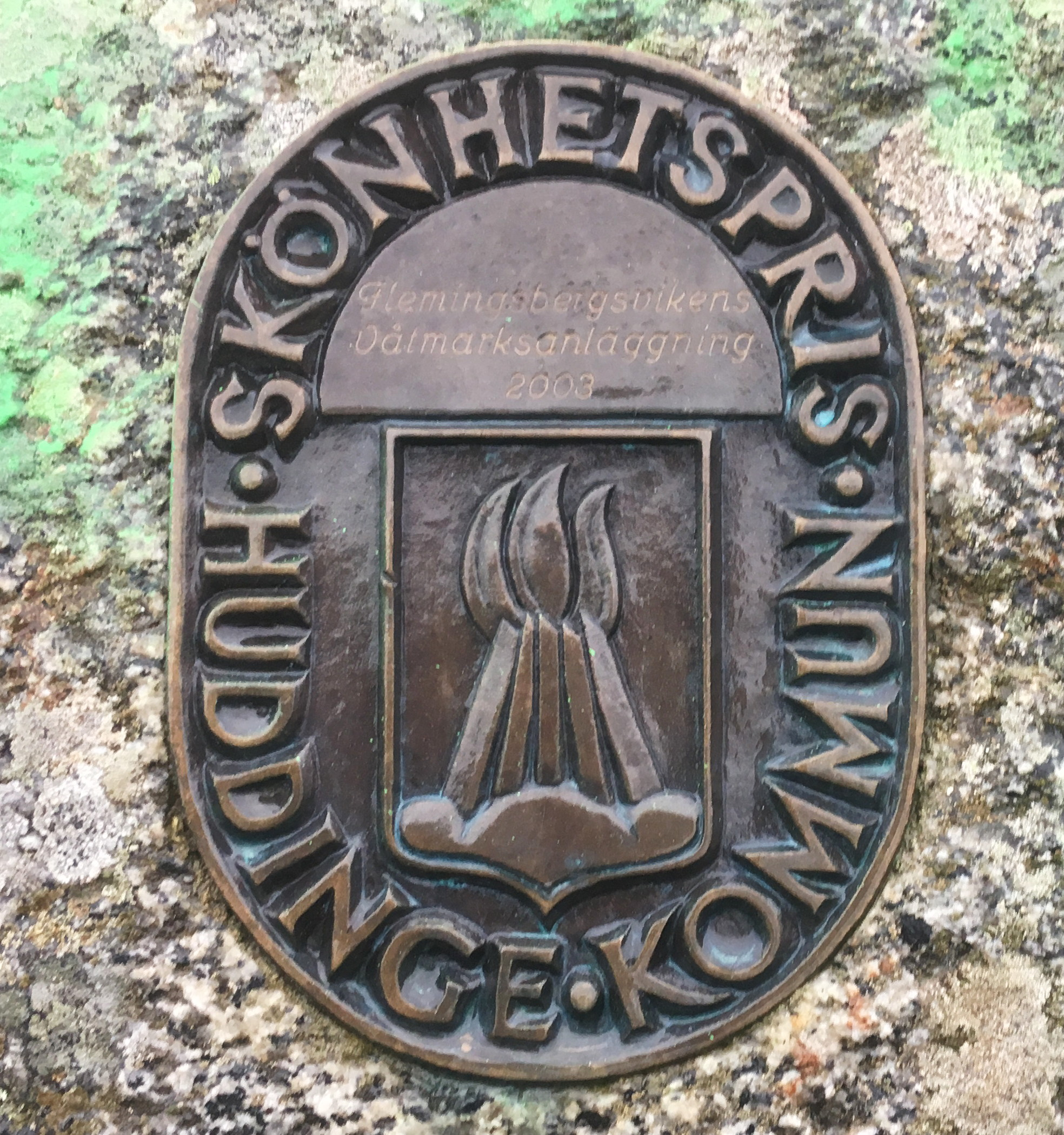 Huddinge kommuns Skönhetspris 2003, uppsatt vid Flemingsbergsvikens våtmarksanläggning